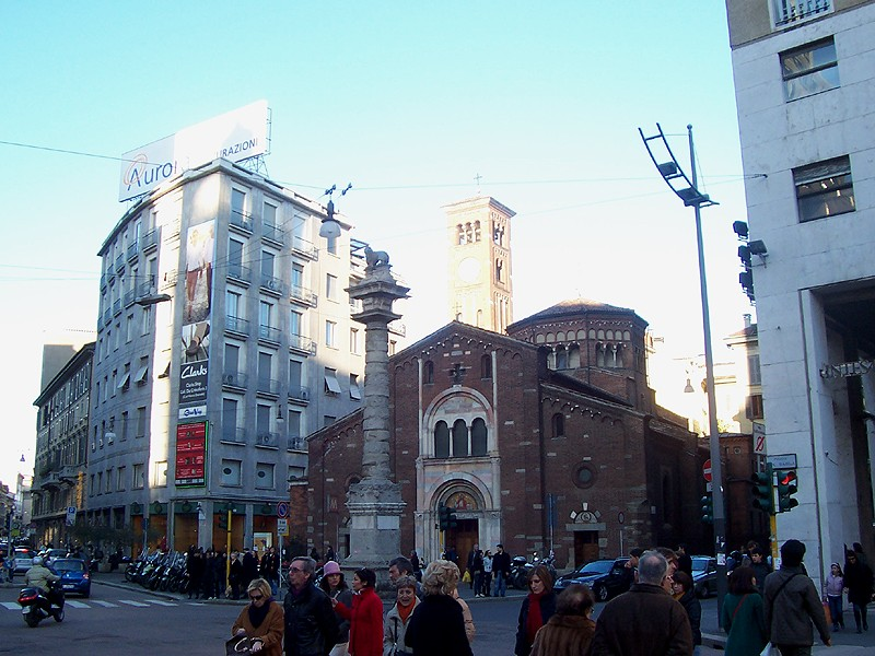 Milano - Chiesa di S. Babila